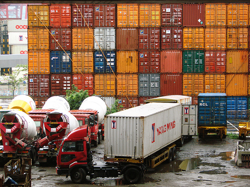 Hong Kong container terminal Hong Kong port